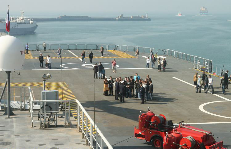 Le public est venu nombreux visiter le pont d'envol du BPC Mistral dans le port de sa future ville marraine Le Havre (6 octobre 2007).